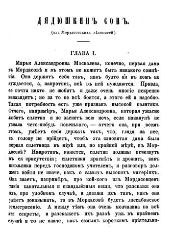 Первая публикация повести Достоевского "Дядюшкин сон", журнал "Русское слово", 1859, № 3